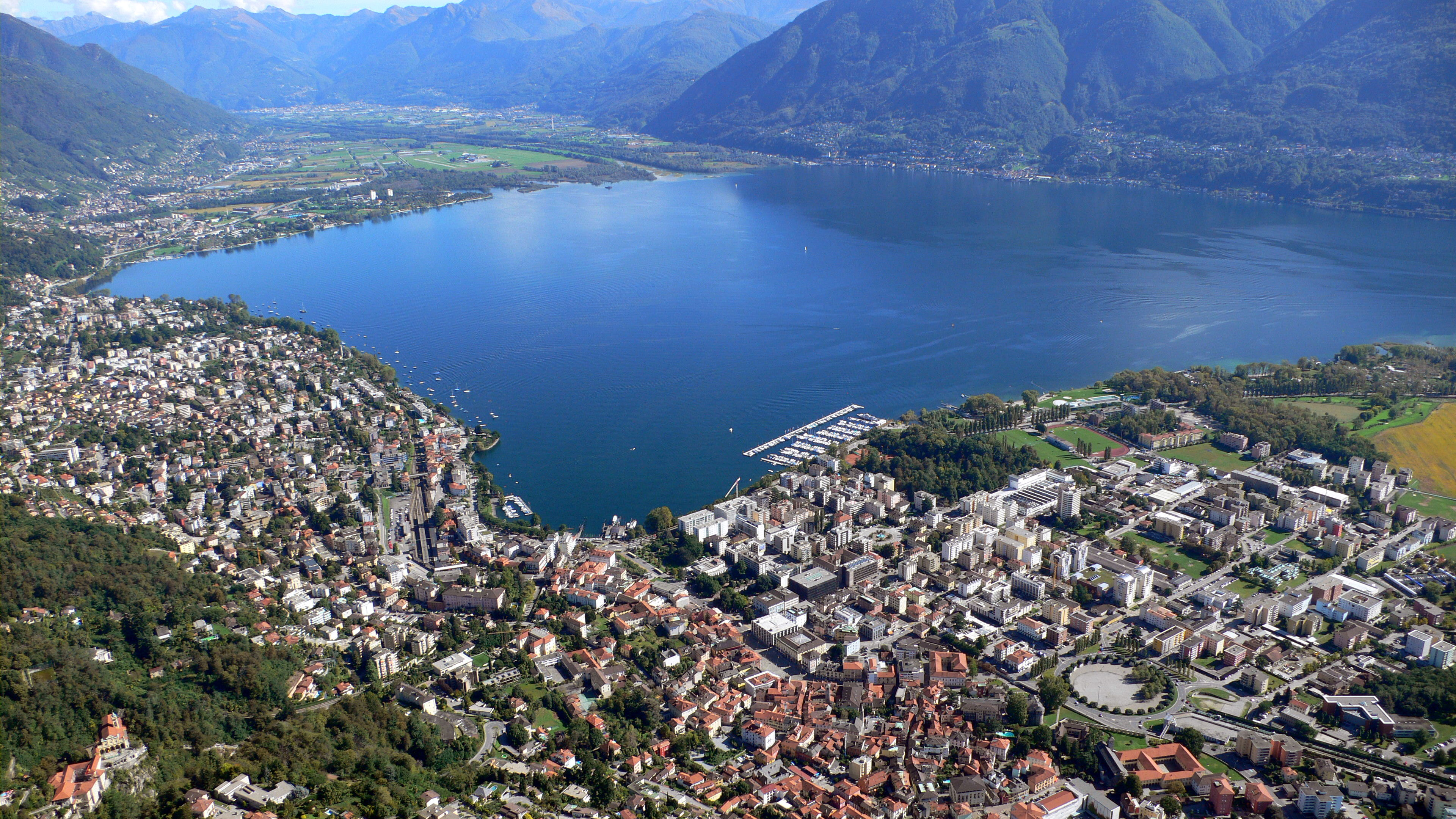 Locarno porto